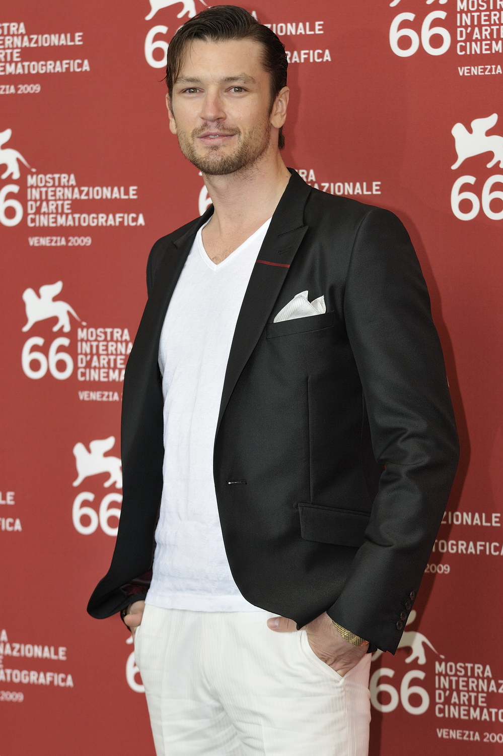 66ème Festival du Cinéma de Venise (Mostra), 4ème jour (05/09/2009)